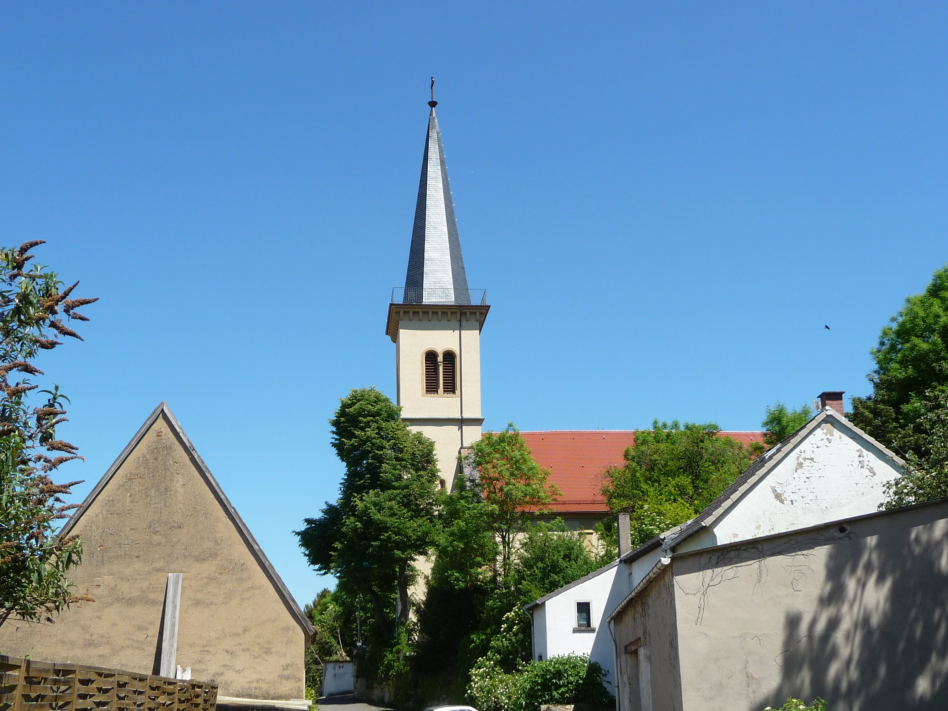 Dittelsheim-Heßloch ist eine Ortsgemeinde im Landkreis Alzey-Worms in Rheinland-Pfalz.